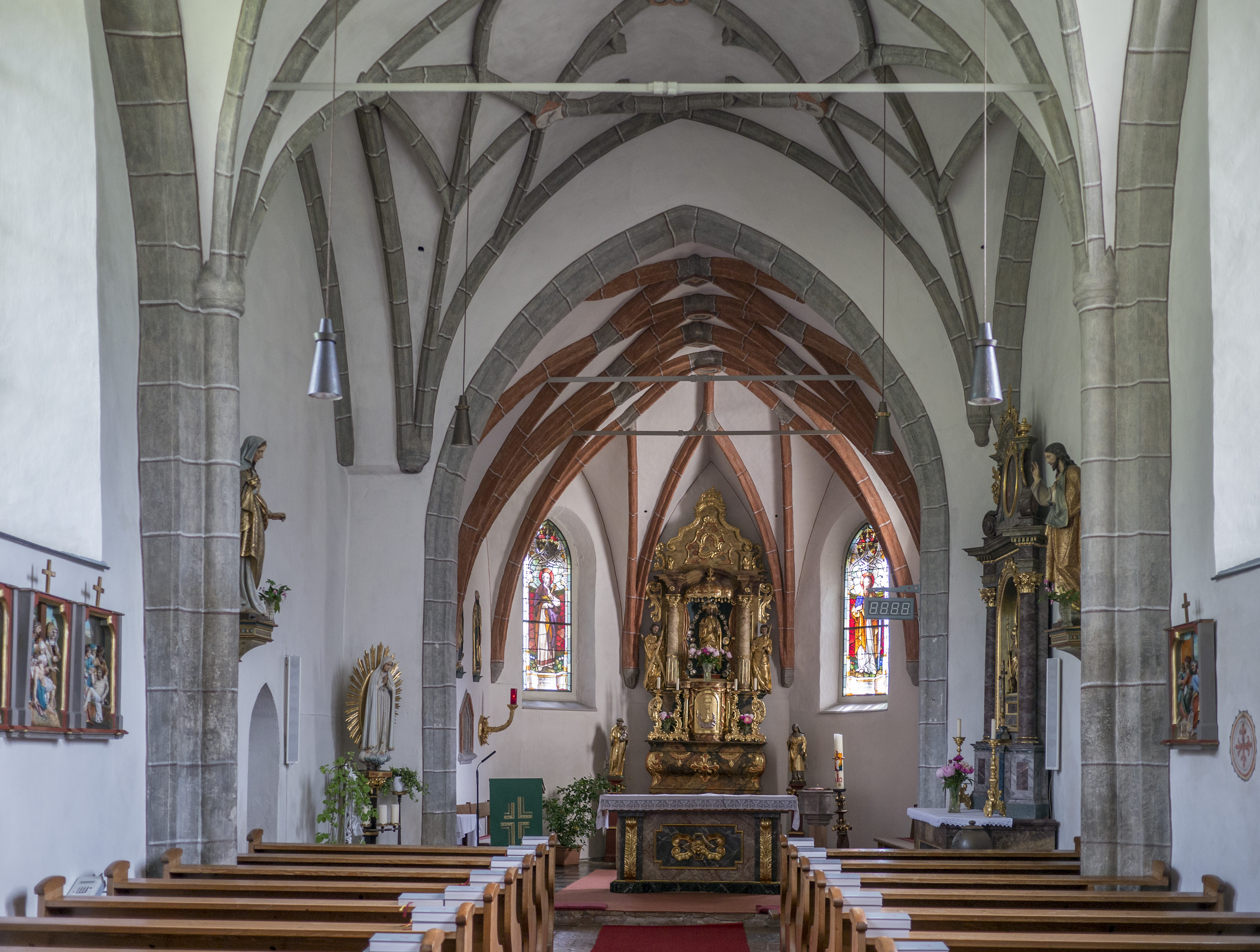 Kath. Pfarrkirche hl. Jakob und Friedhof